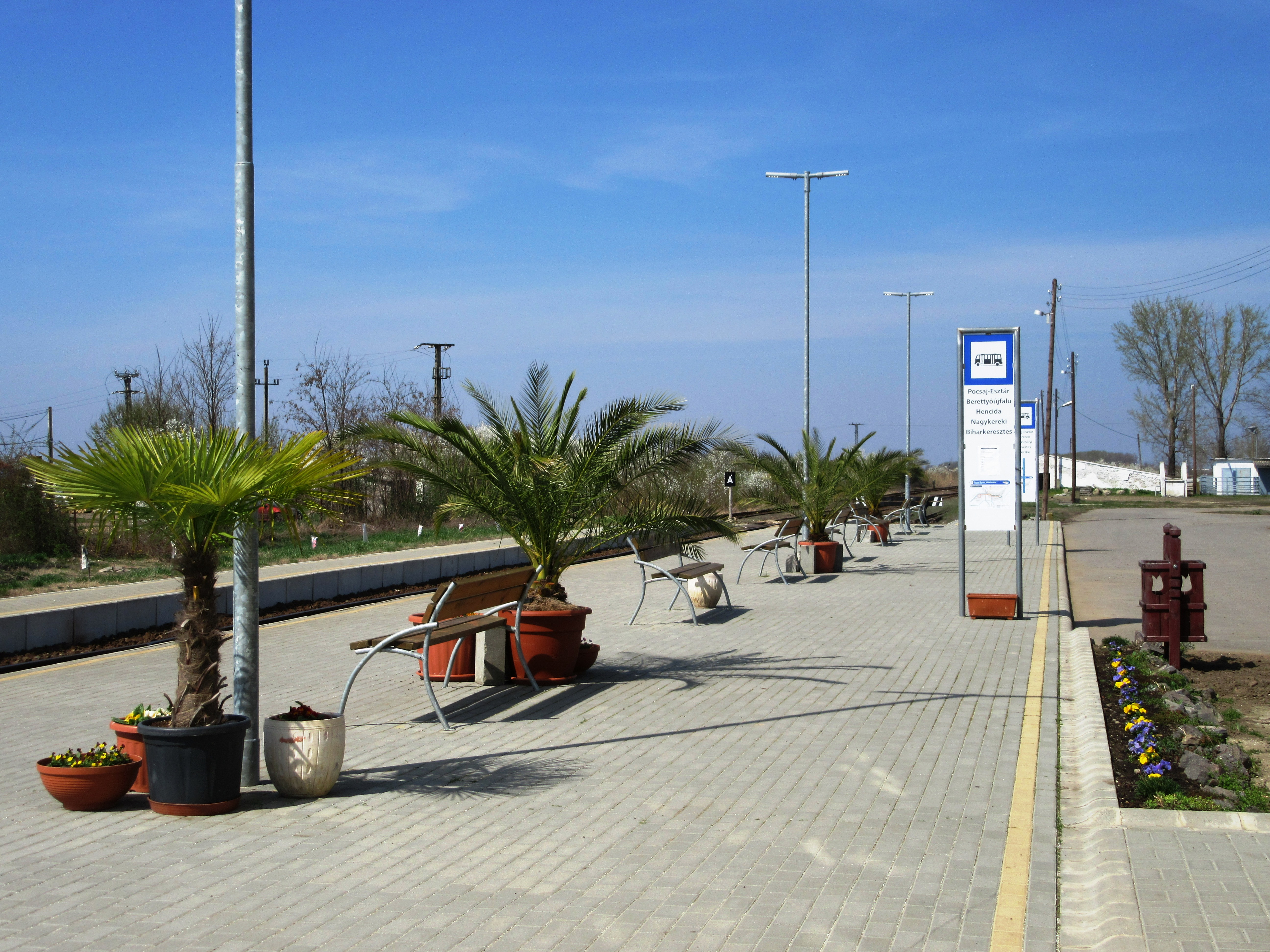 Új csomópont a távolsági busz és a vonat között